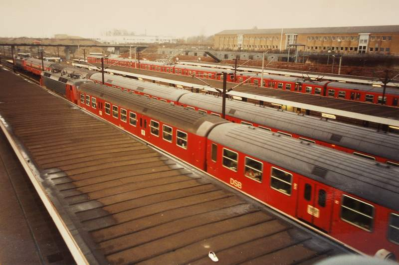 Høje Taastrup Station in Copenhagen, Denmark